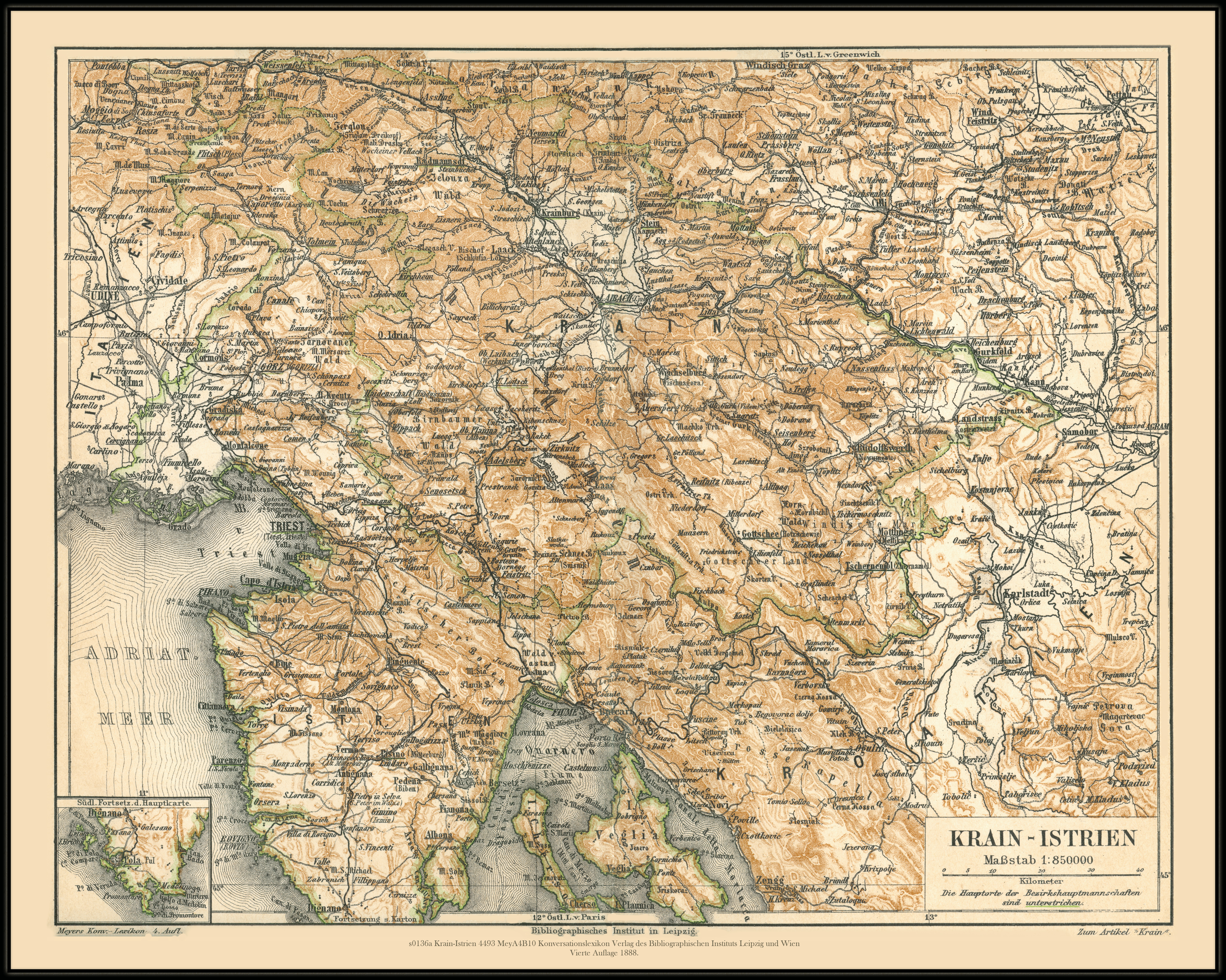 Krain-Istrien.